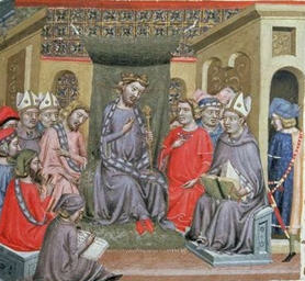 Alfons XI. kastilský